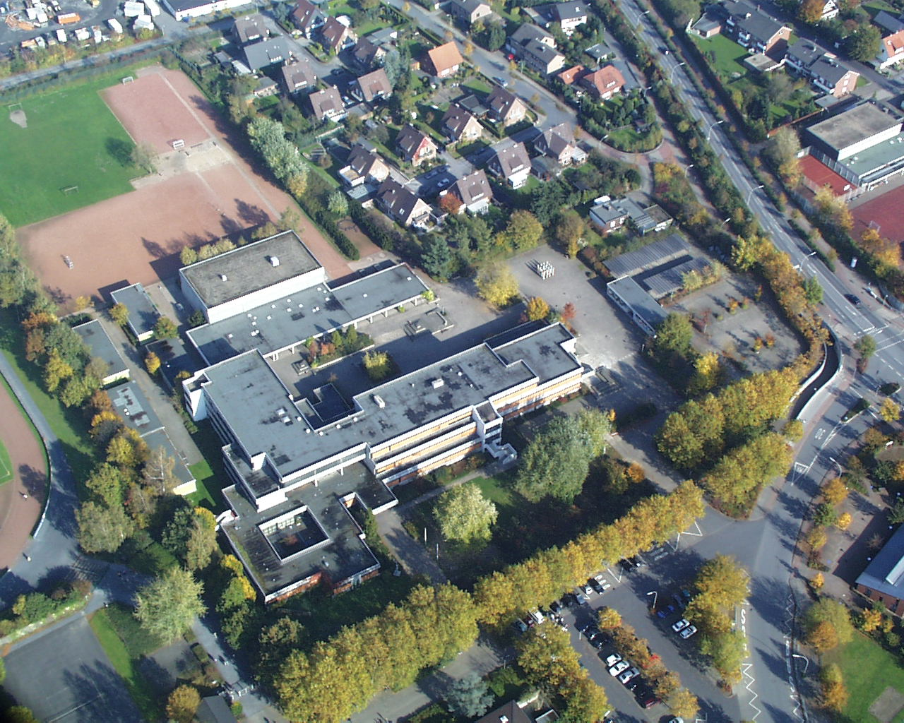 Luftaufnahme (Schrägbild) des Gymnasium Laurentianum Warendorf